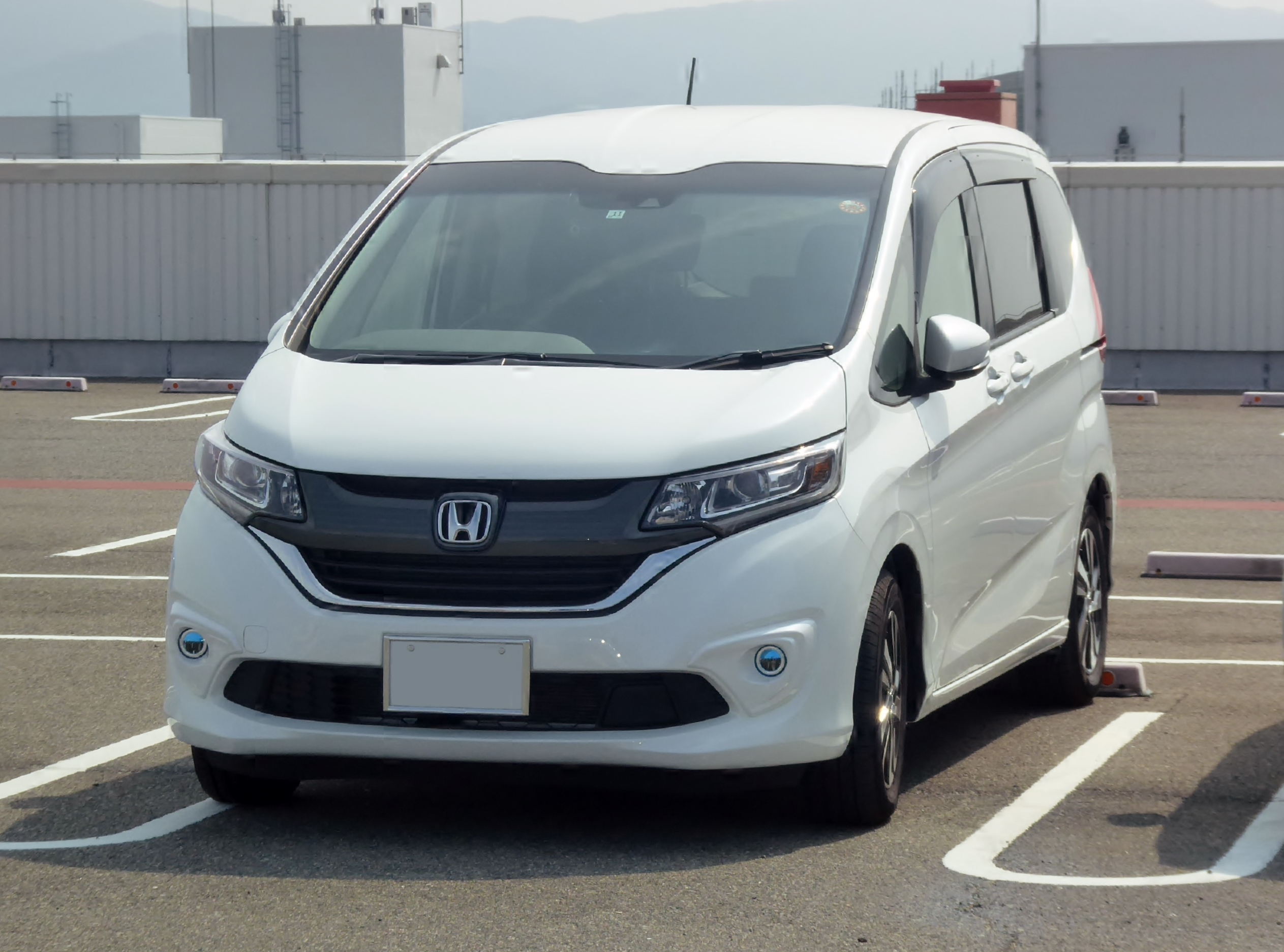 DBA-GB5型ホンダ・フリード+をフロントから撮影。